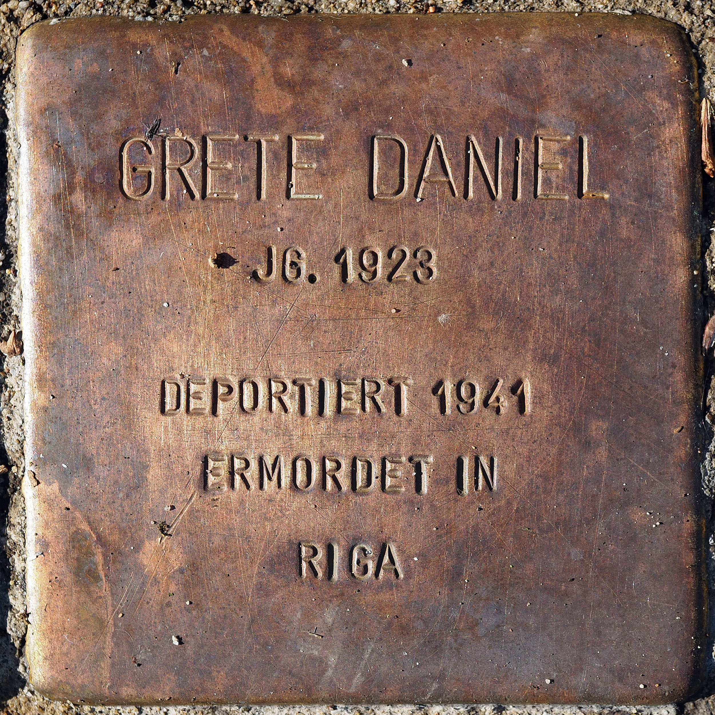 Stolperstein DU: Daniel, Grete